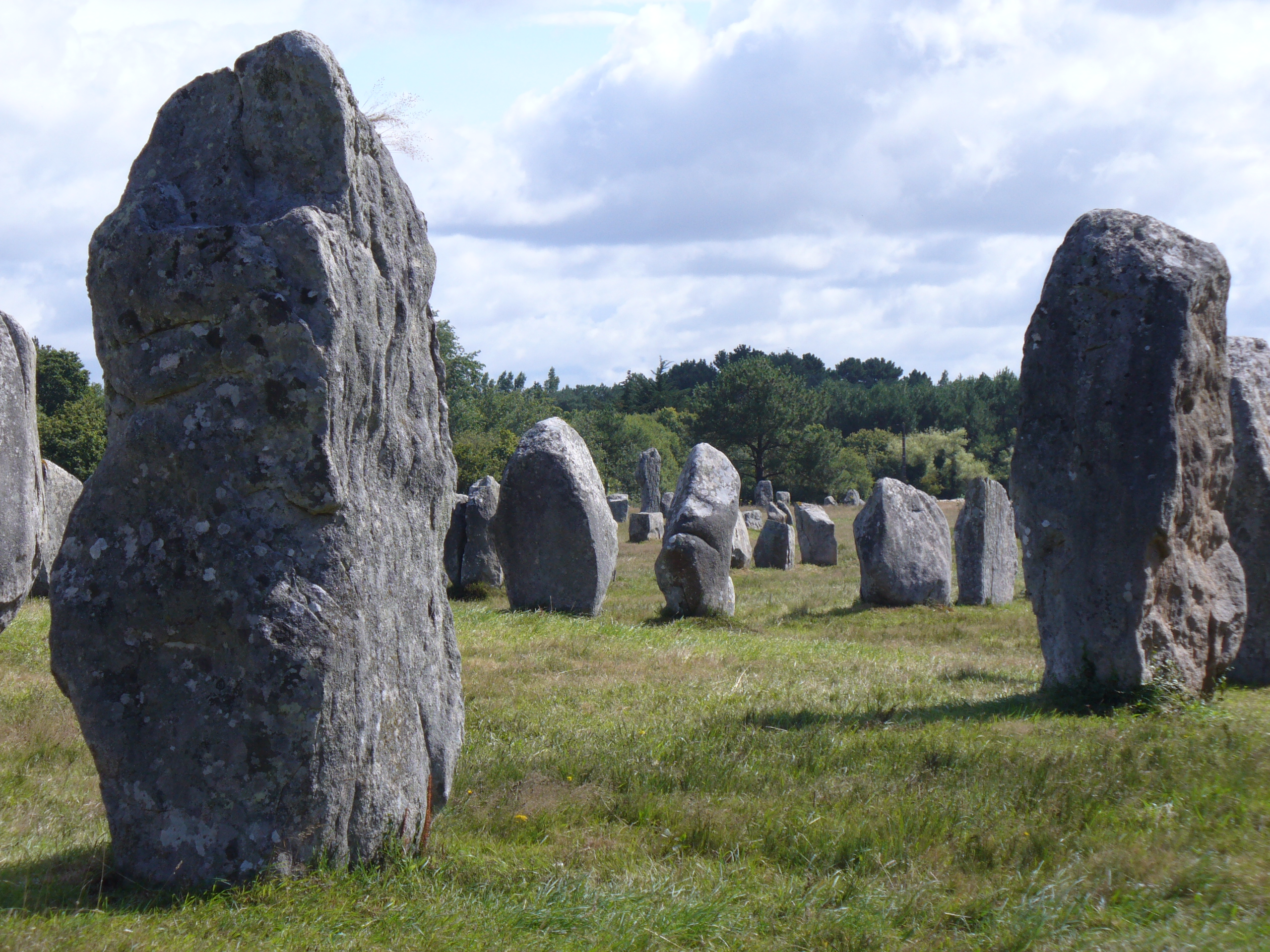 1099 Menhire,bis zu 4 Meter hoch,von Ost nach West in 1167 Meter Langen Alignements(Steinreihen) in einem Halbkreis(Cromlechs) endend. (Jungsteinzeit, Neolithikum ,Neolithic ,Néolithique 4500-2300 v.Chr.) Megalithanlage von Le Ménec, Carnac ,Departement Morbihan ,Bretagne